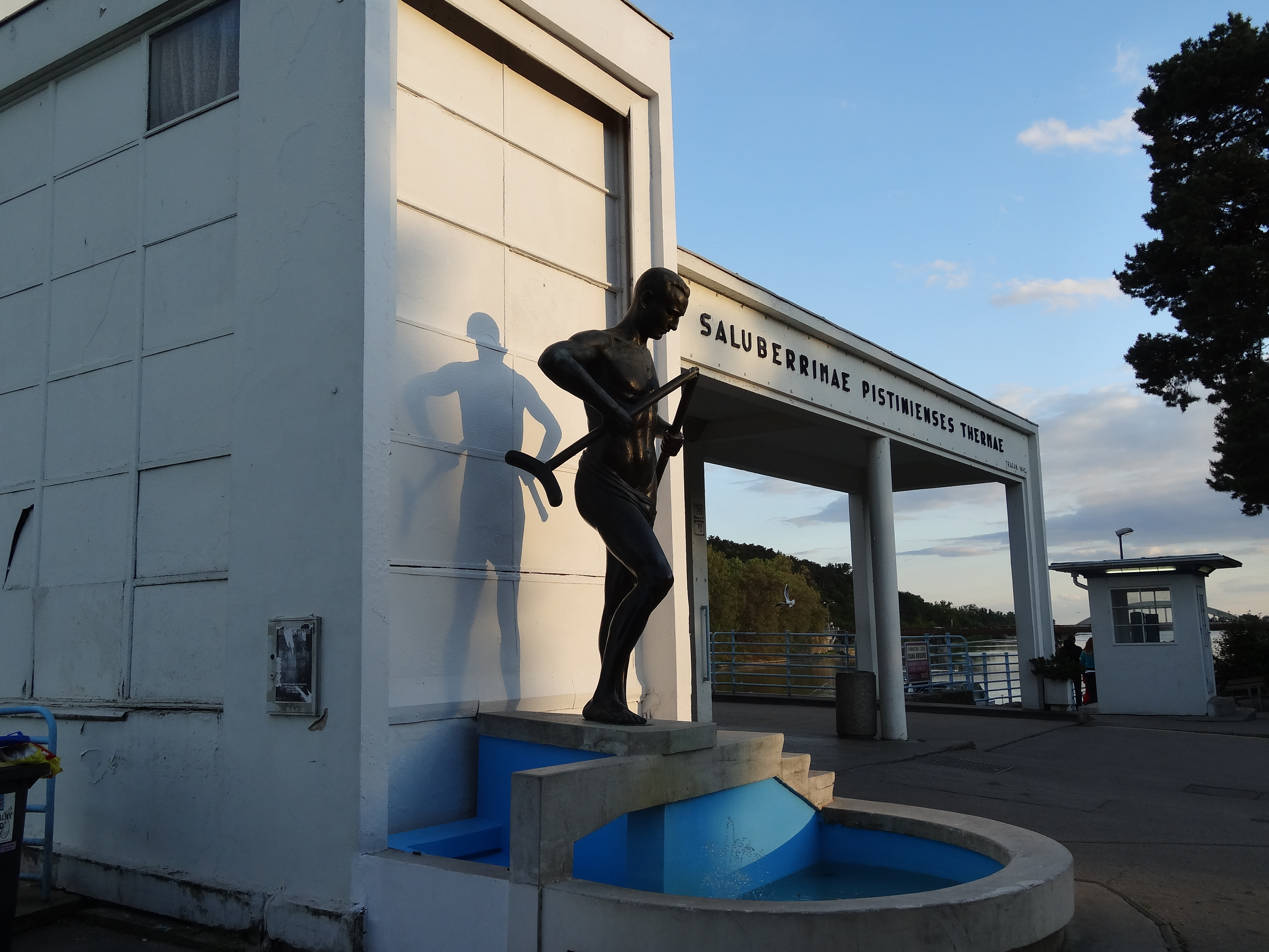 Русиньскый: Барлоламач у Пєштянох (Словеньско)